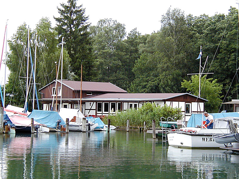 Seglerhafen von Stahl Finow in Wildau am Werbellinsee Kamera Olympus Camedia C960